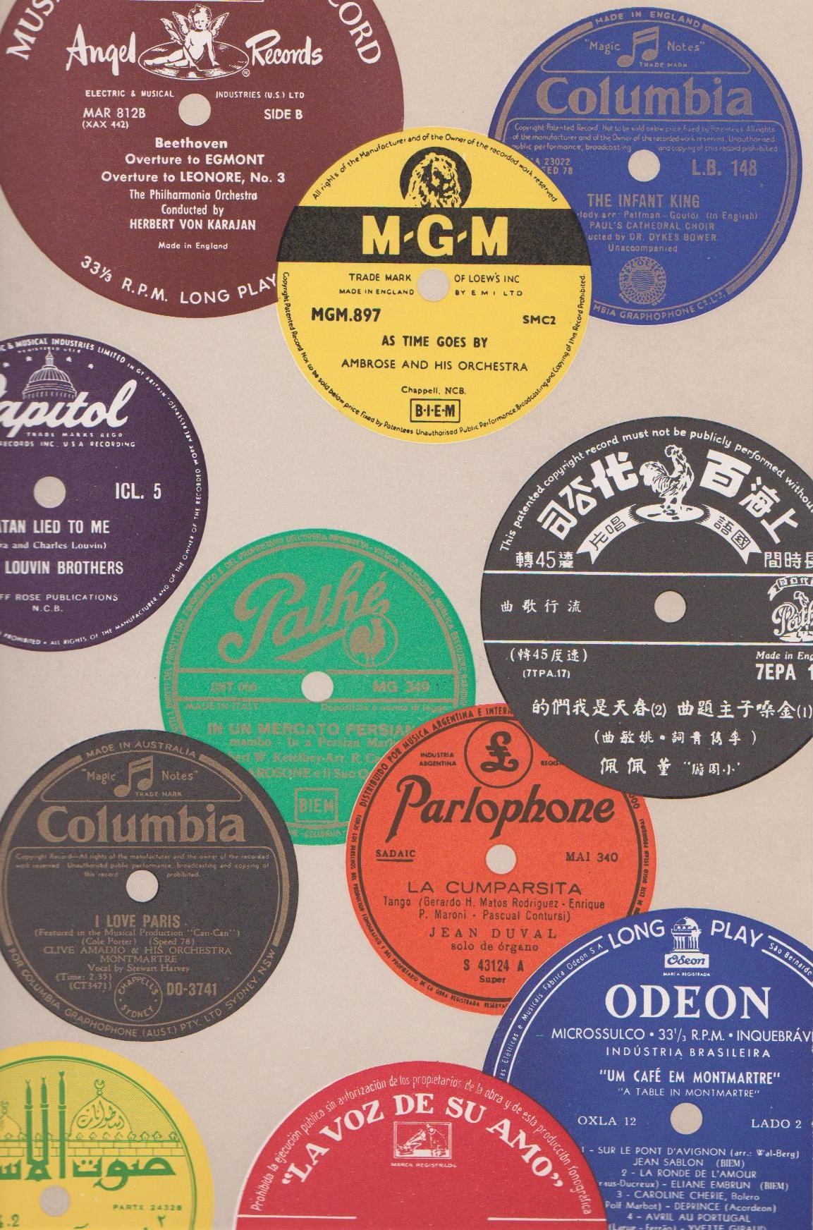 Description quelques unes des productions de Pathé-Marconi en 1955 CC-by-sa quelques unes des productions de Pathé-Marconi en 1955